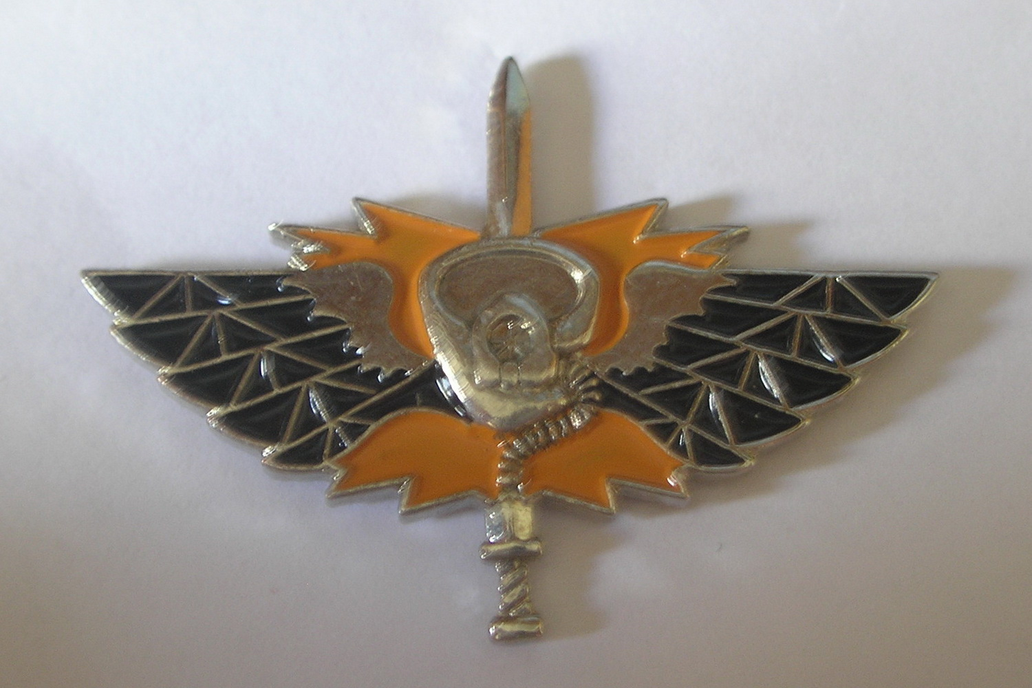 סיכת לוחם של יחדת אב"כ,חיל ההנסה